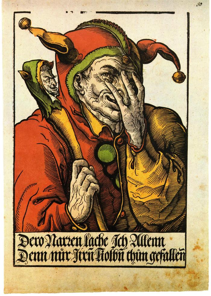 Der Schalksnarr